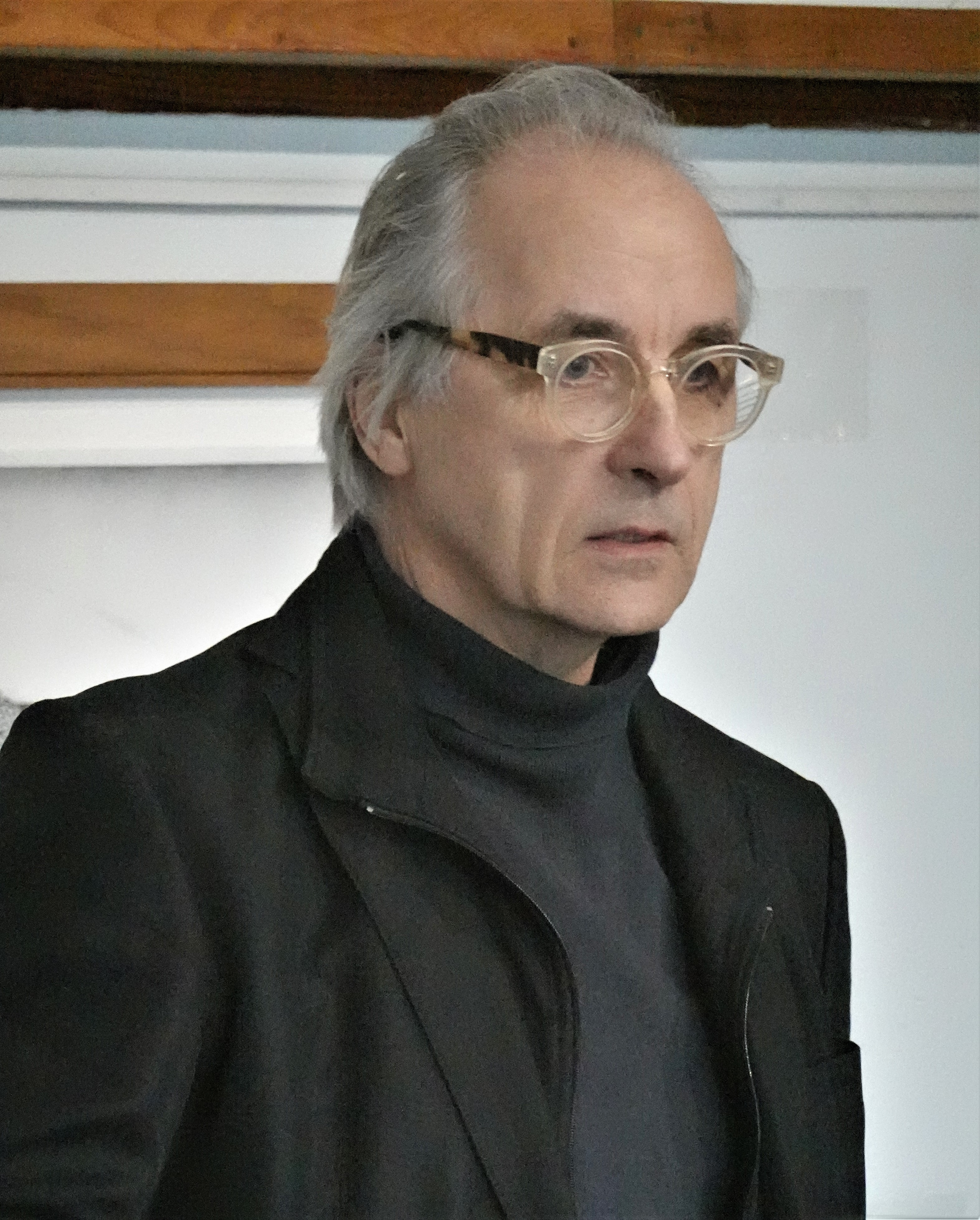 Kuva taiteilijasta Gallen-Kallelan museon tiedotustilaisuudessa